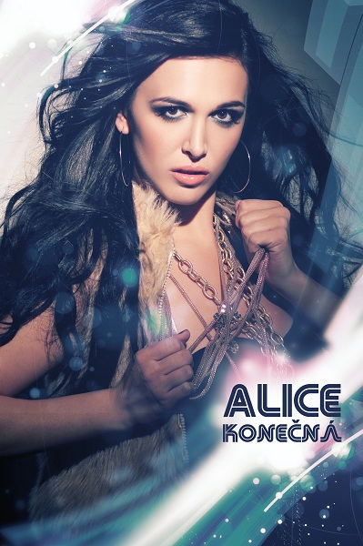 Česká zpěvačka Alice Konečná